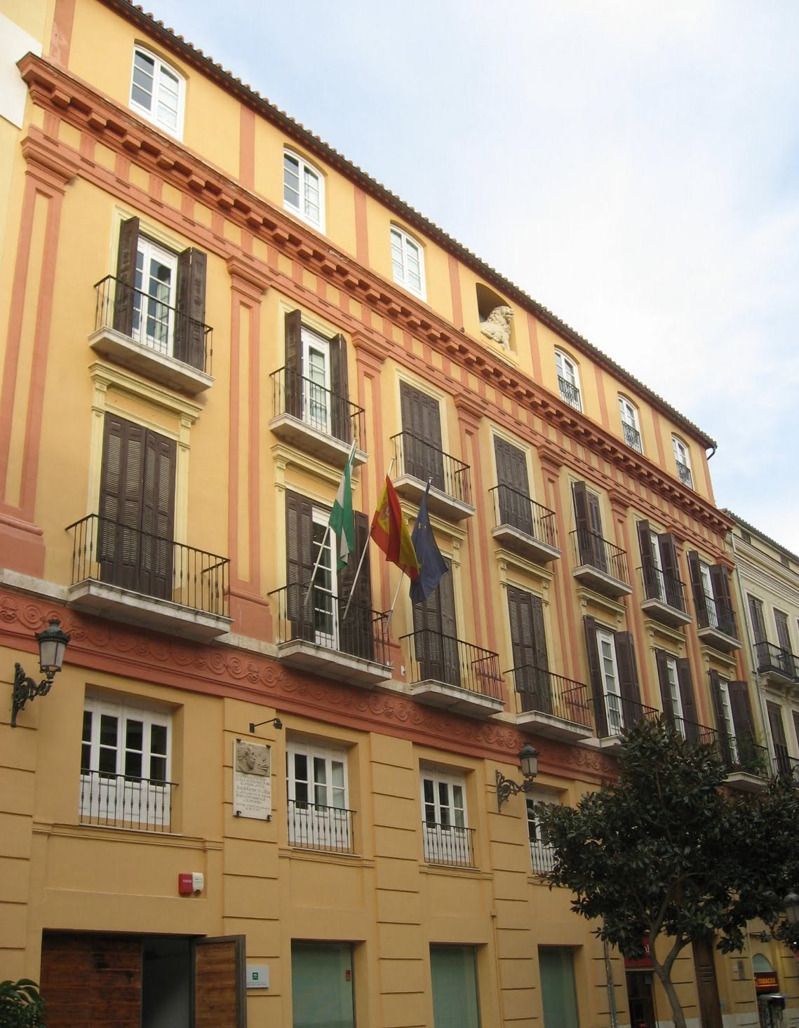 Sede de Turismo Andaluz en calle Compañía 36, Málaga.